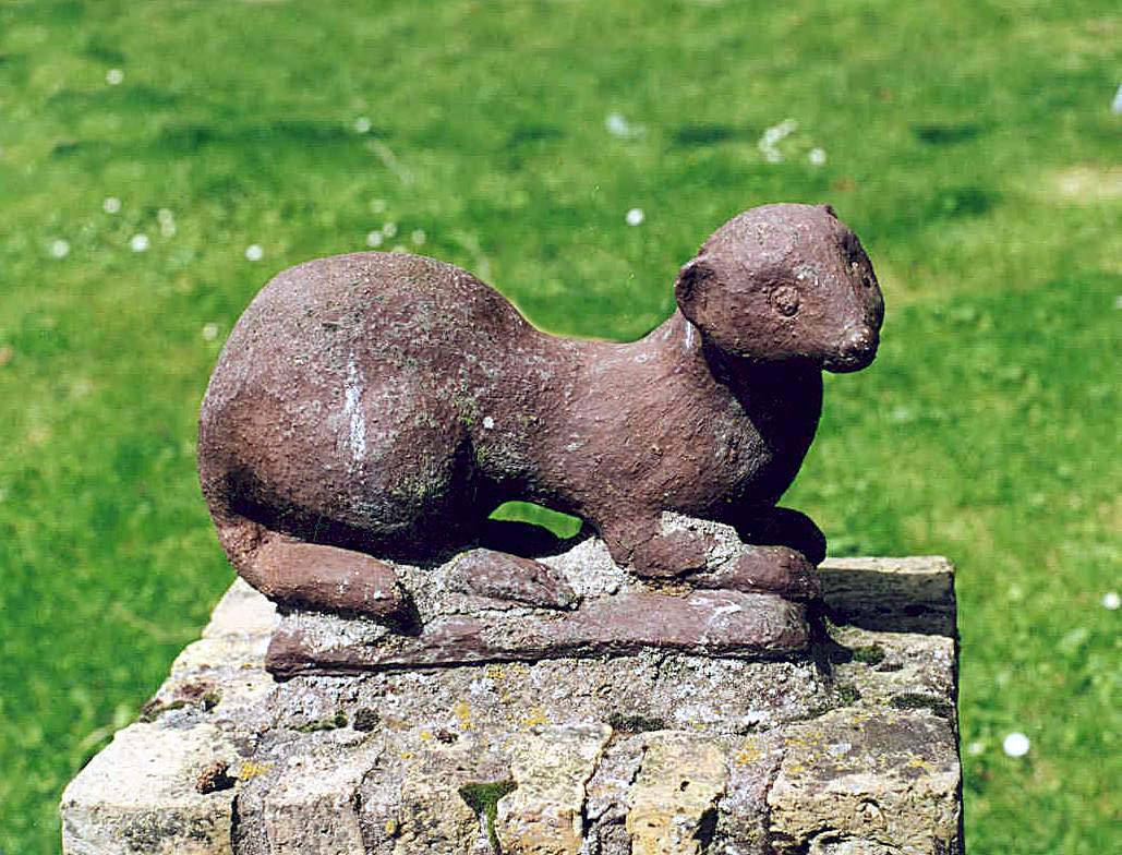 Judith Boer, 1985